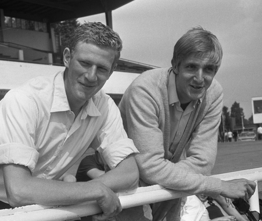 Ruud Stokvis (left) and Roel Luynenburg